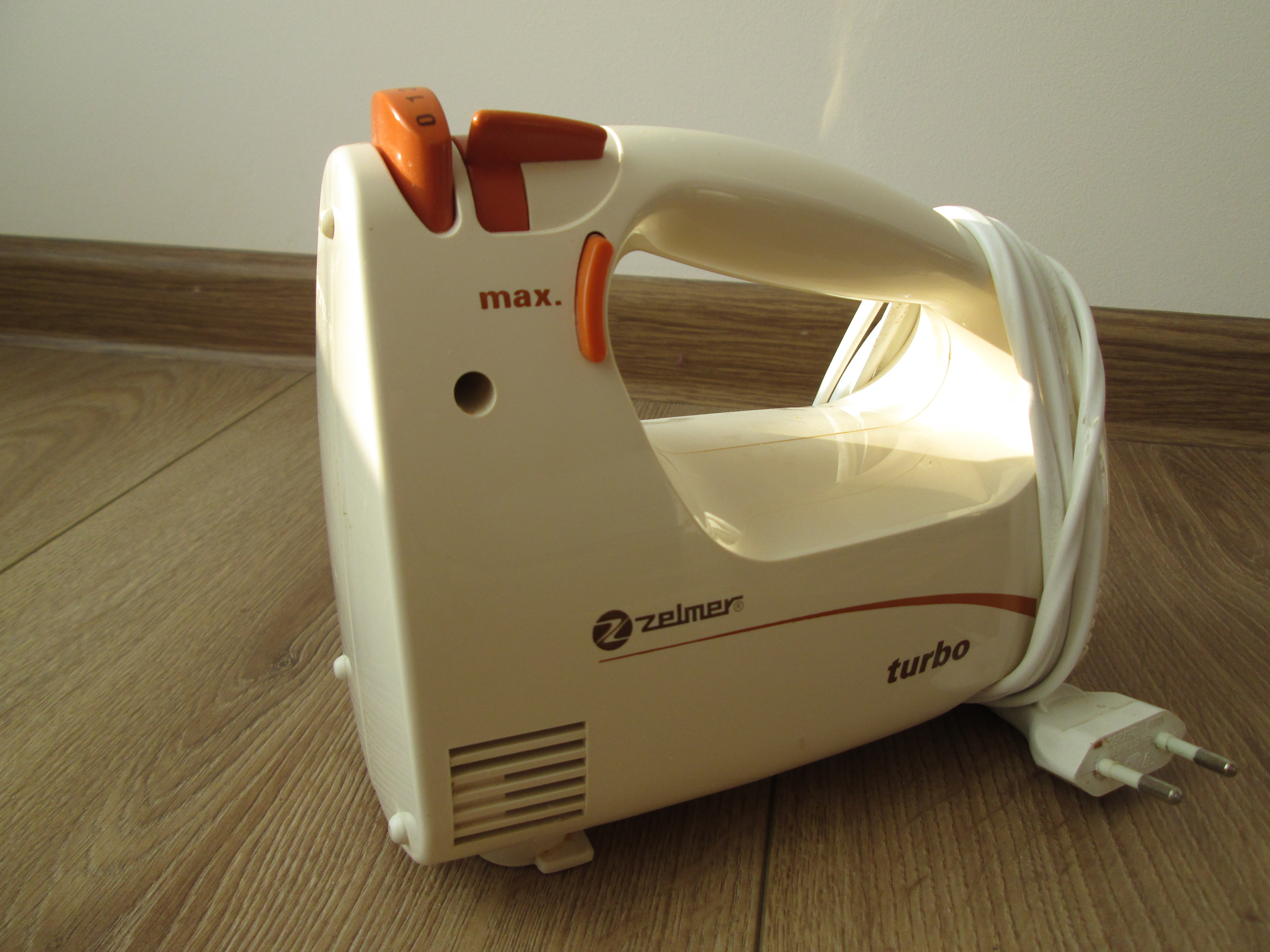 Mikser/robot kuchenny Zelmer 181